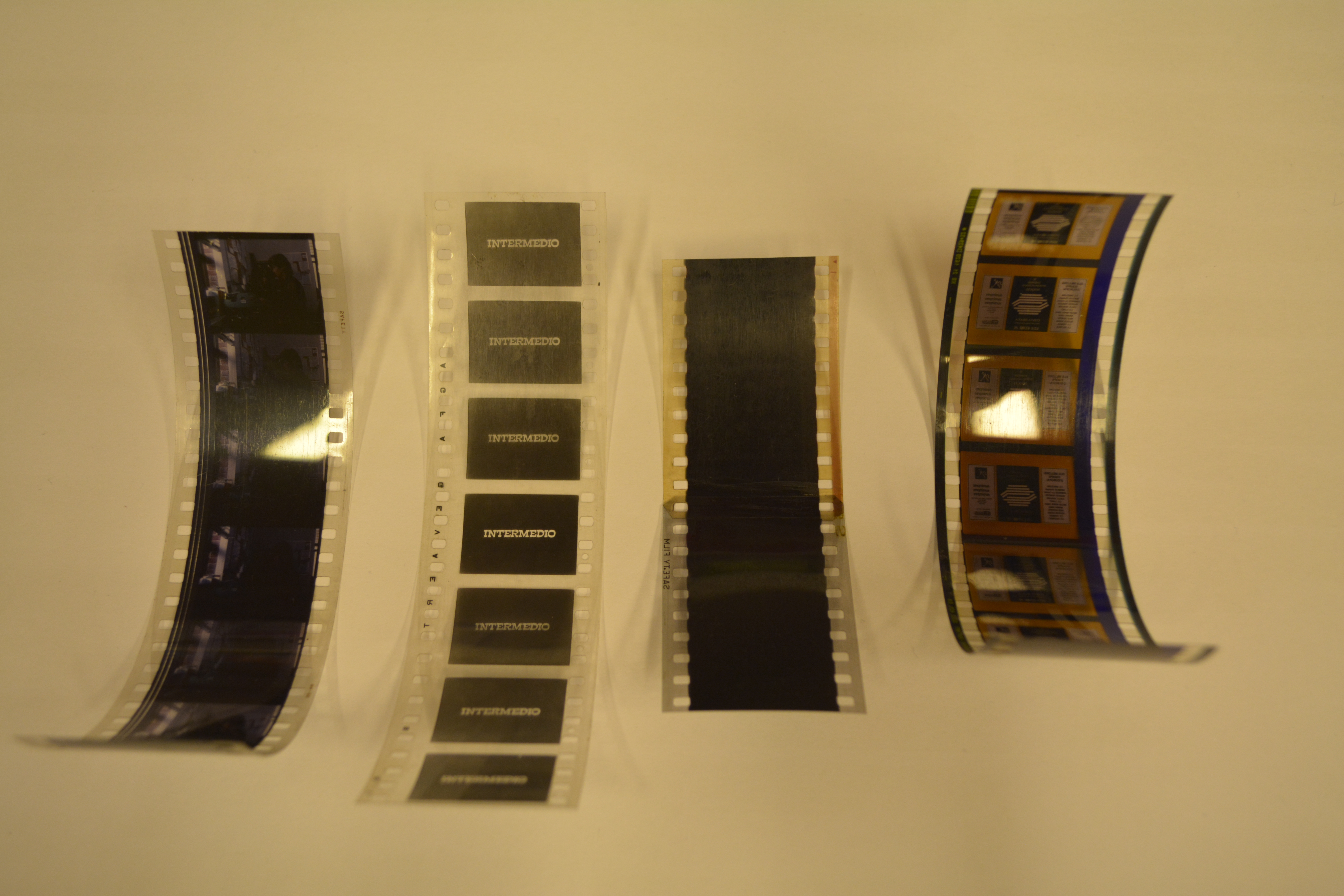 Imatge de pel·lícules de nitrat de cel·lulosa.